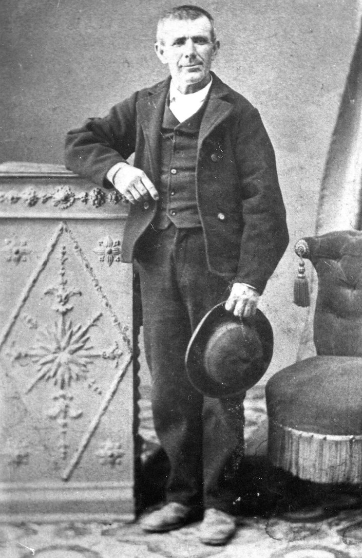 fotografia de el Rollo.